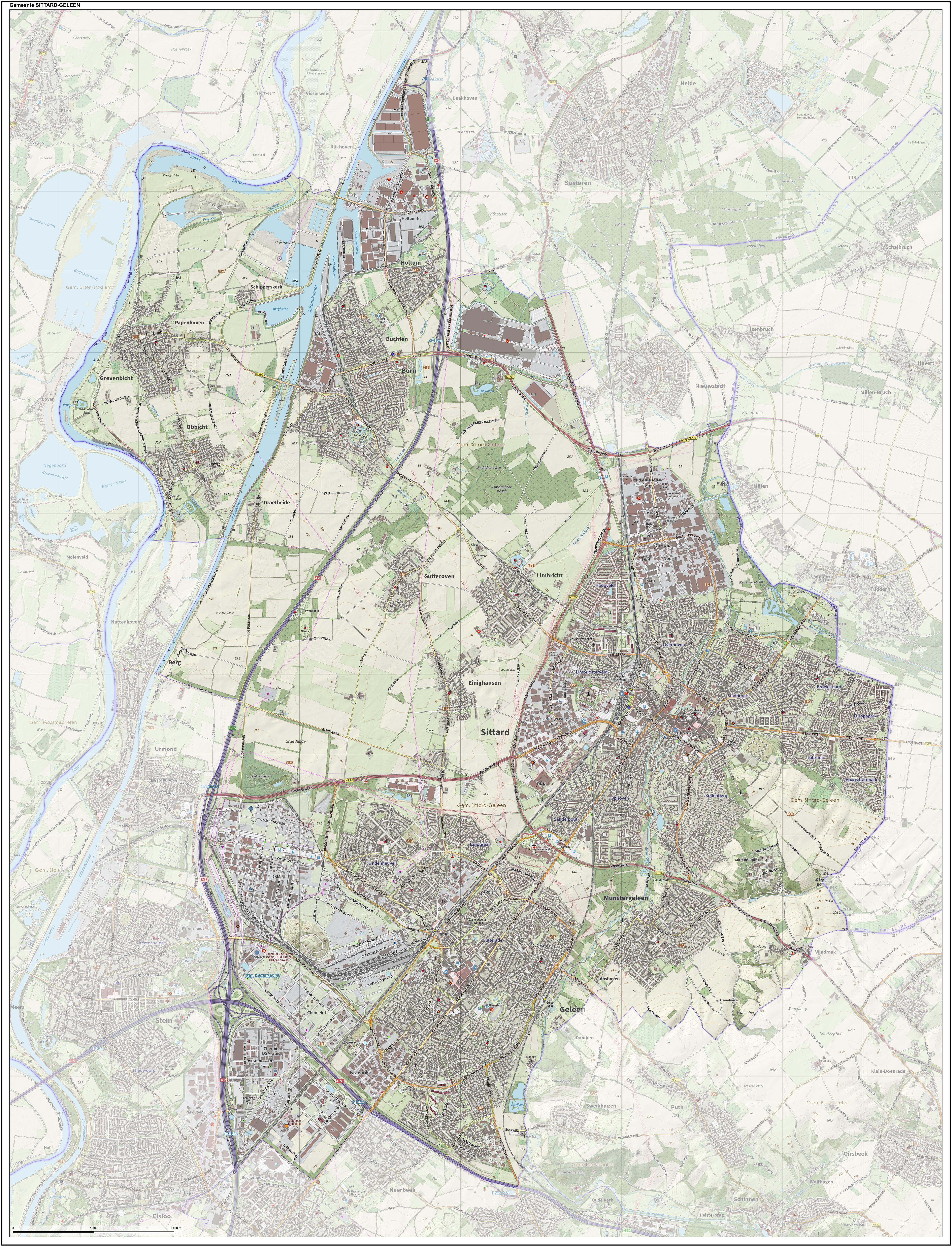 Topografische gemeentekaart. Resolutie: 400 pixels/km. Kaartbeeld samengesteld uit de open geodata van de Top10NL en Top25namen (Kadaster), Creative Commons-BY licentie. Gebouwvlakken uit open geodata BAG extract. Wegen uit de OpenStreetMap, OpenStreetMap community. Reliëfschaduw uit de Actuele Hoogtekaart AHN2. Samenstelling en kleurenschema: Jan-Willem van Aalst, met QGIS. Zie ook de Legenda.